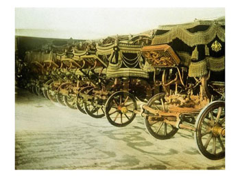 Ukázka díla Rudolfa Brunnera Dvořáka